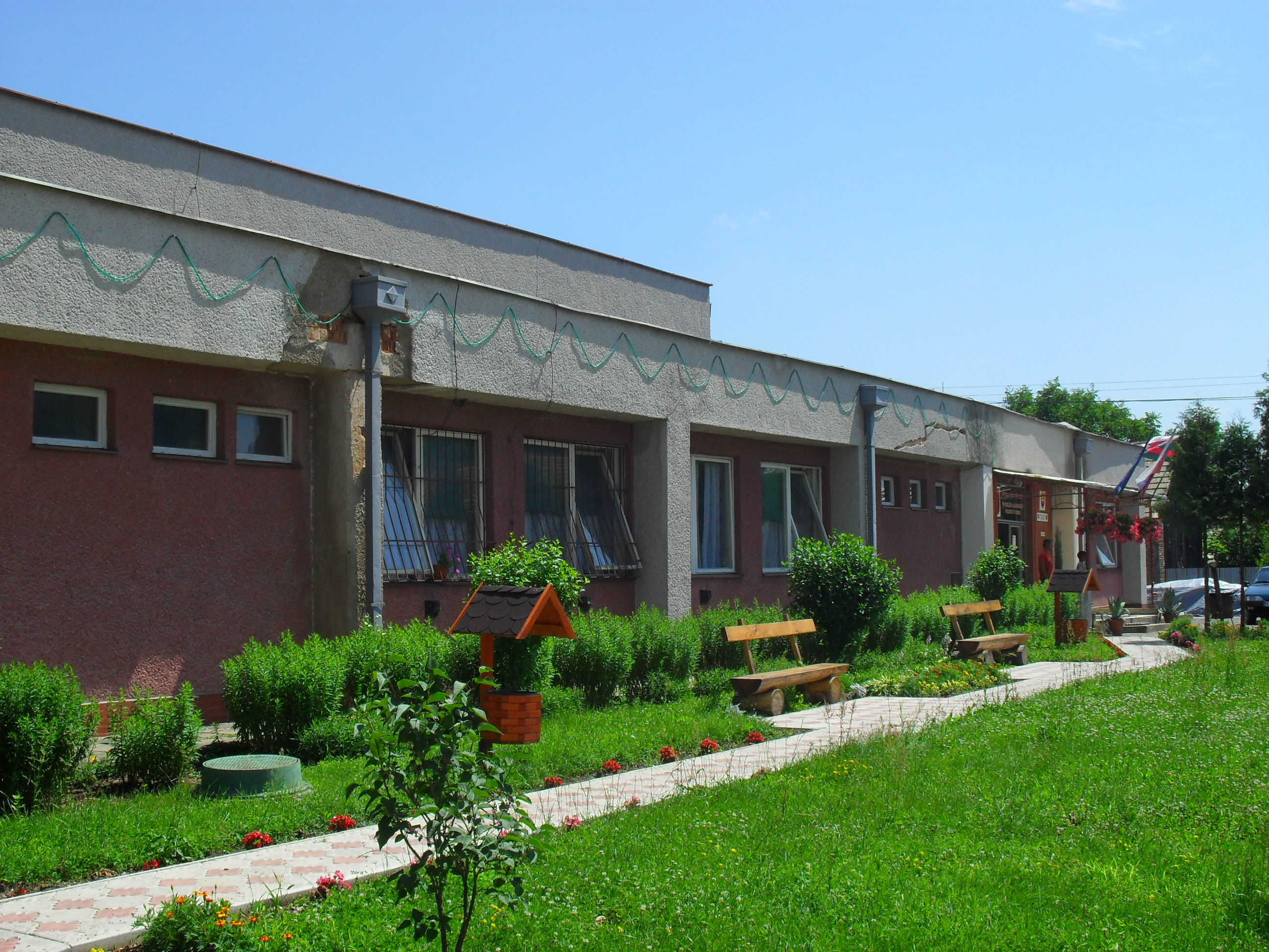 Sajógömör - községi hivatal